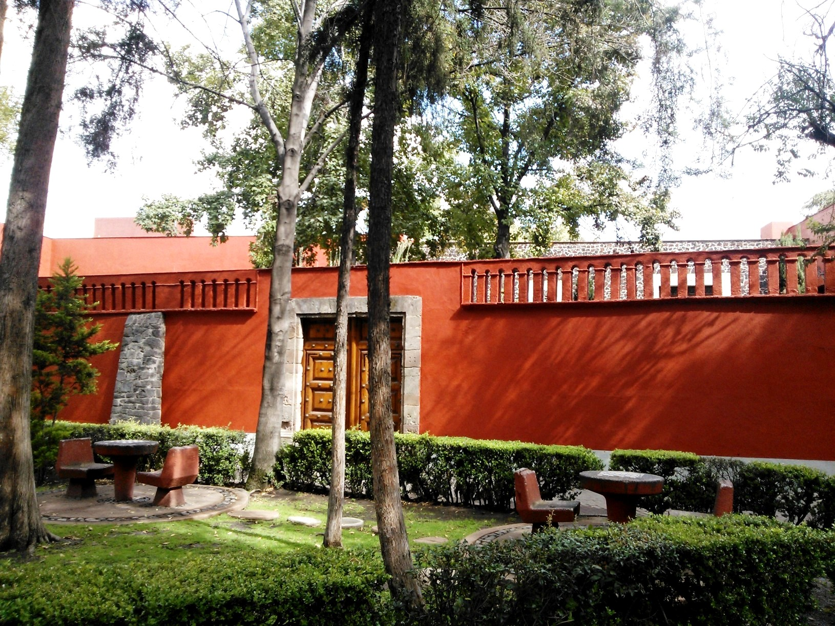 Obraje de Mixcoac visto desde la plaza Jáuregui